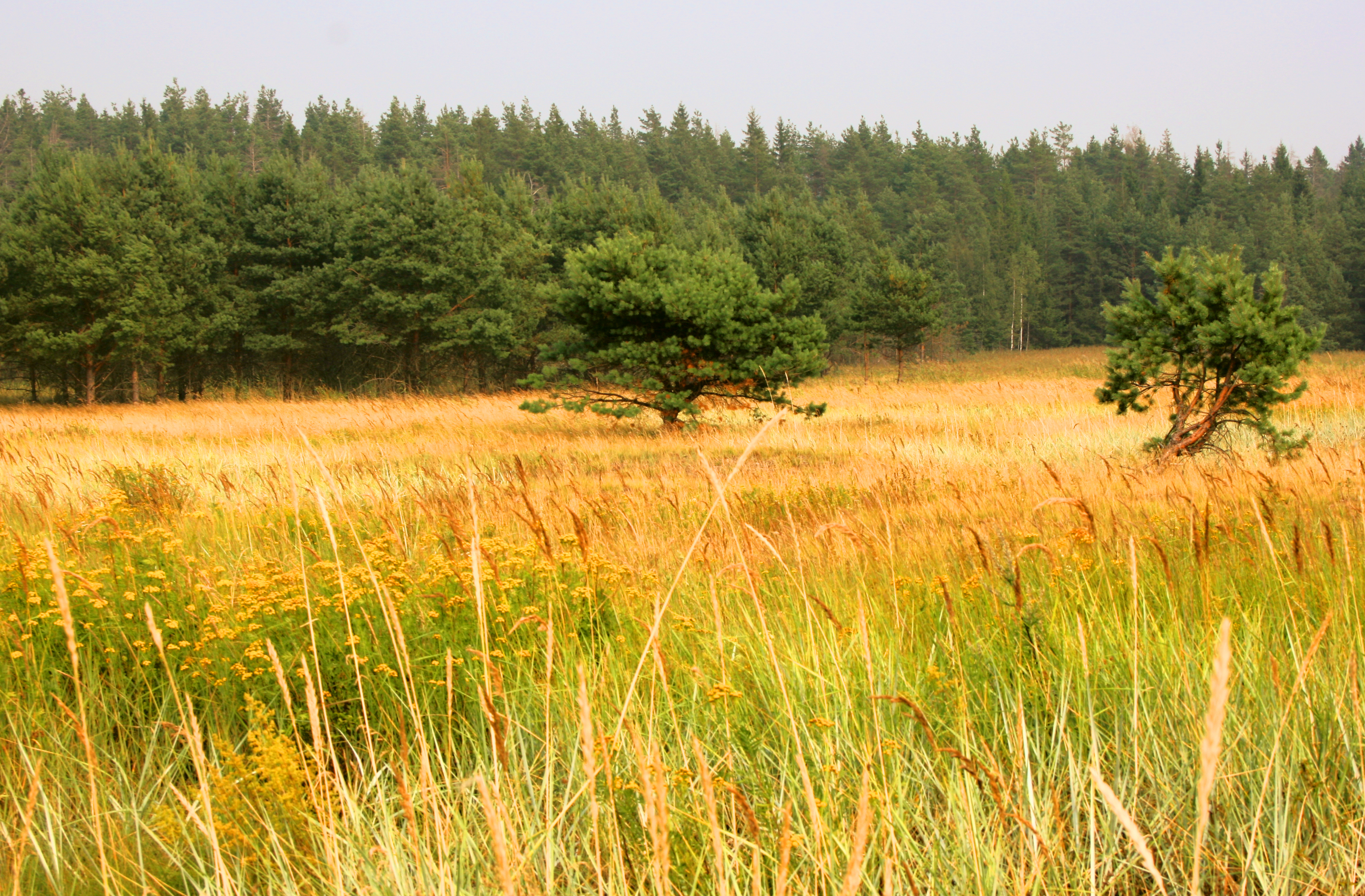 Конново 2010